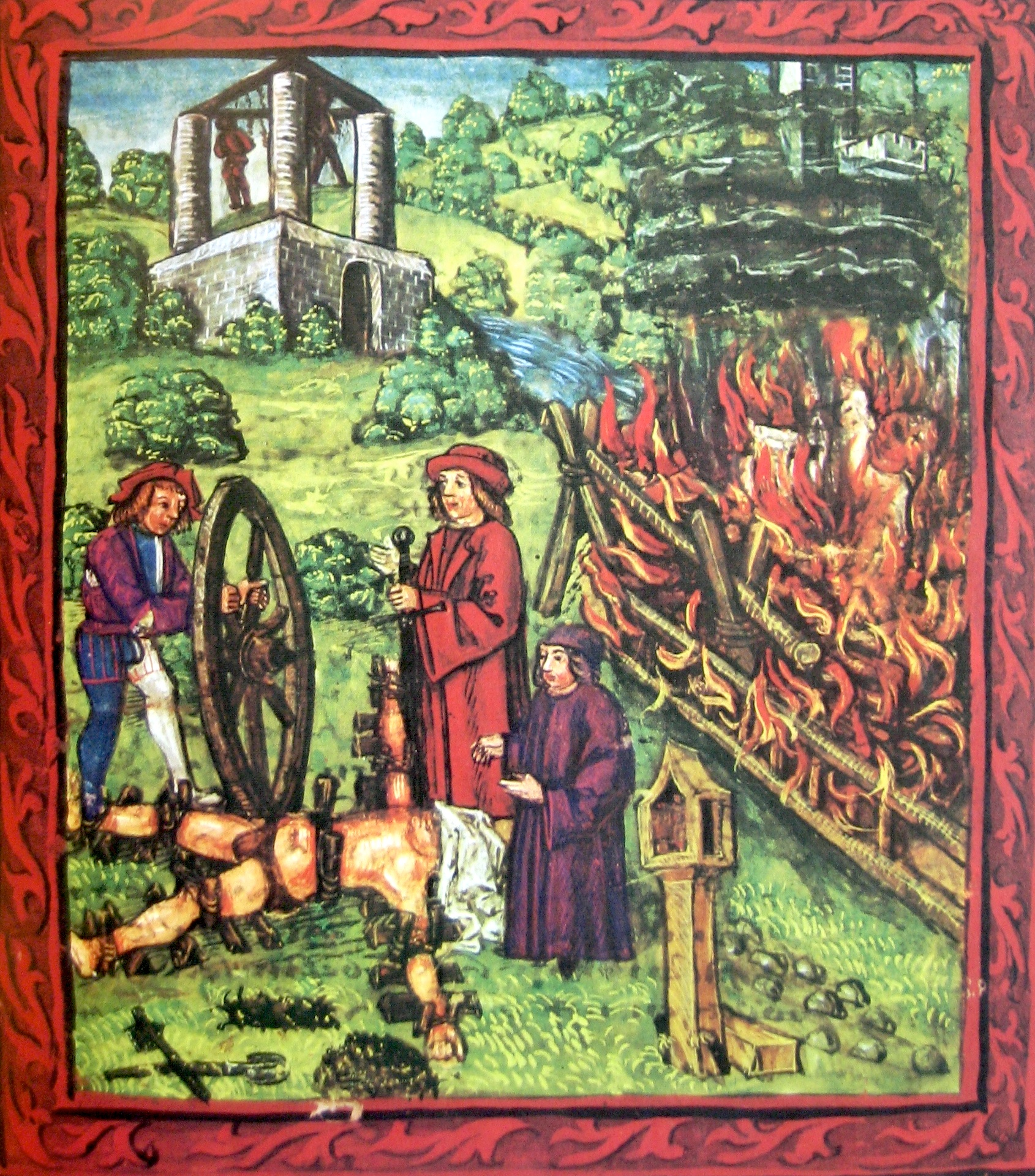 Die Luzerner Richtstätte 1495. Mittelalterliche Justiz: links der Henker, auf das Richtschwert gestützt der Blutrichter, daneben eine Selbstdarstellung des Chronisten Schilling, der die Vollstreckung des Urteils verhindert, weil er erfahren hat, dass der verurteilte Landstreicher unschuldig ist. Rechts hinten die Museggtürme. Aus der Luzerner Chronik von Diebold Schilling.